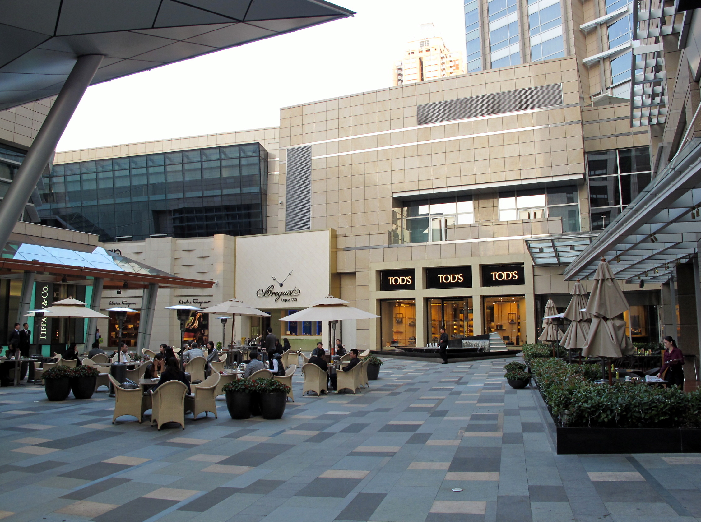 Mixc Shenzhen Phase 2